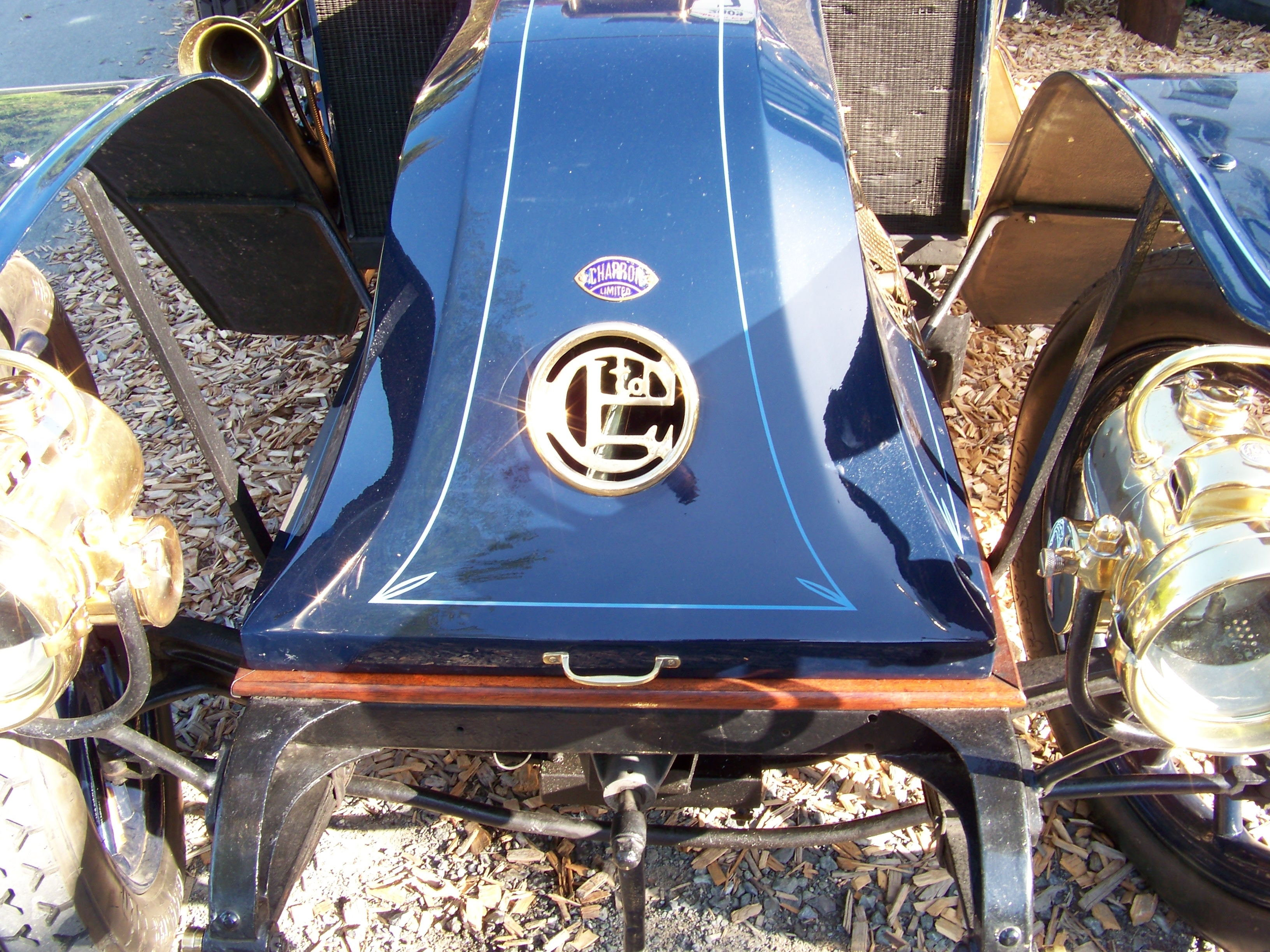 Charron Limited, Front mit Firmenzeichen, bei der IV. Schmallenberger Veteranen-Tour, MSC-Schmallenberg (Germany)